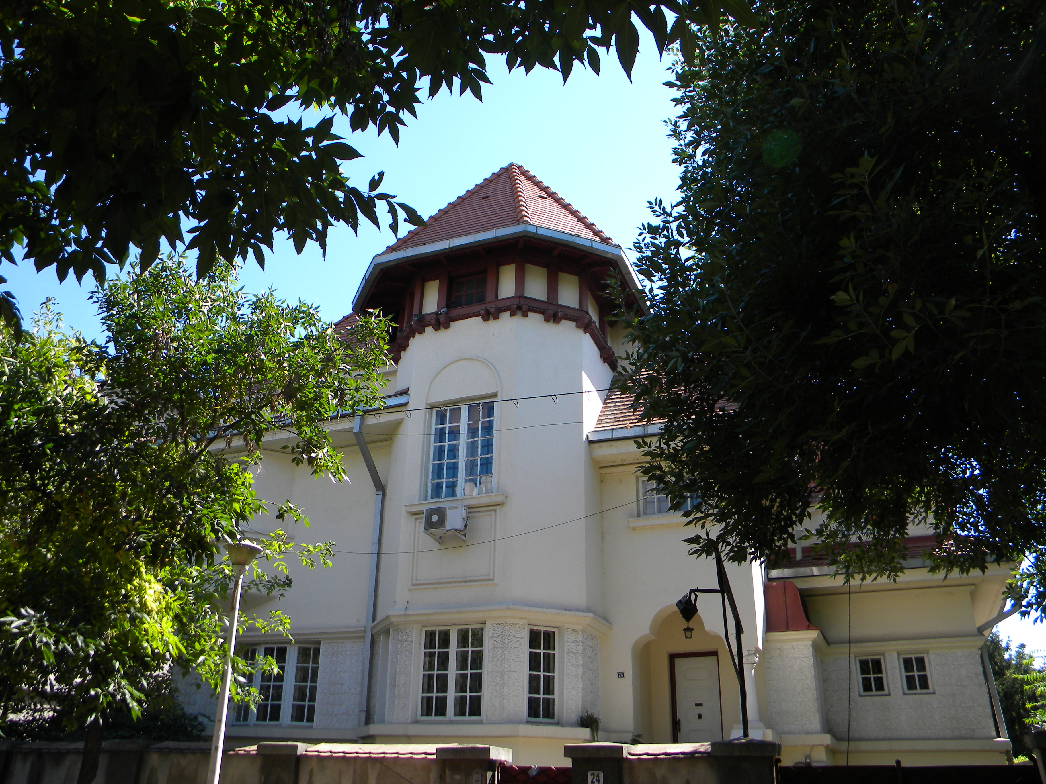 Bucuresti, Romania, Str. Andrei Muresanu nr. 24; B-II-m-B-19269